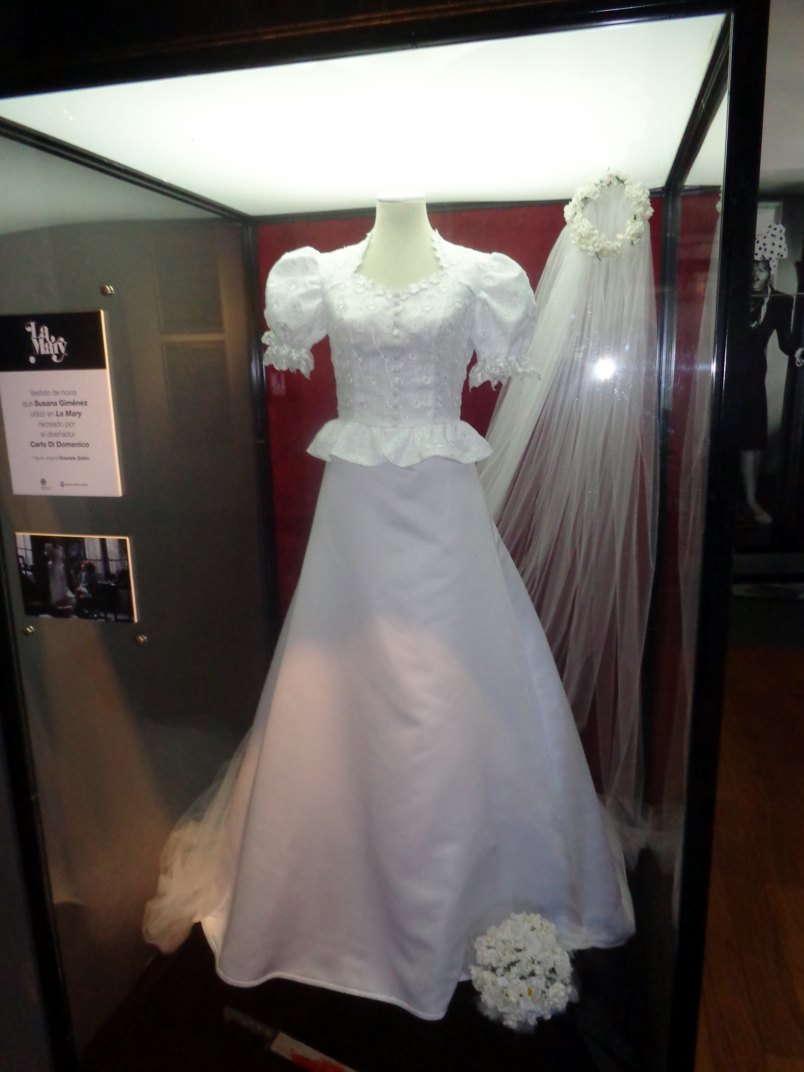 Vestido de novia utilizado por Susana Giménez en la película La Mary, recreado por el diseñador Carlo Di Doménico, en el Museo del Cine Pablo Ducrós Hicken.